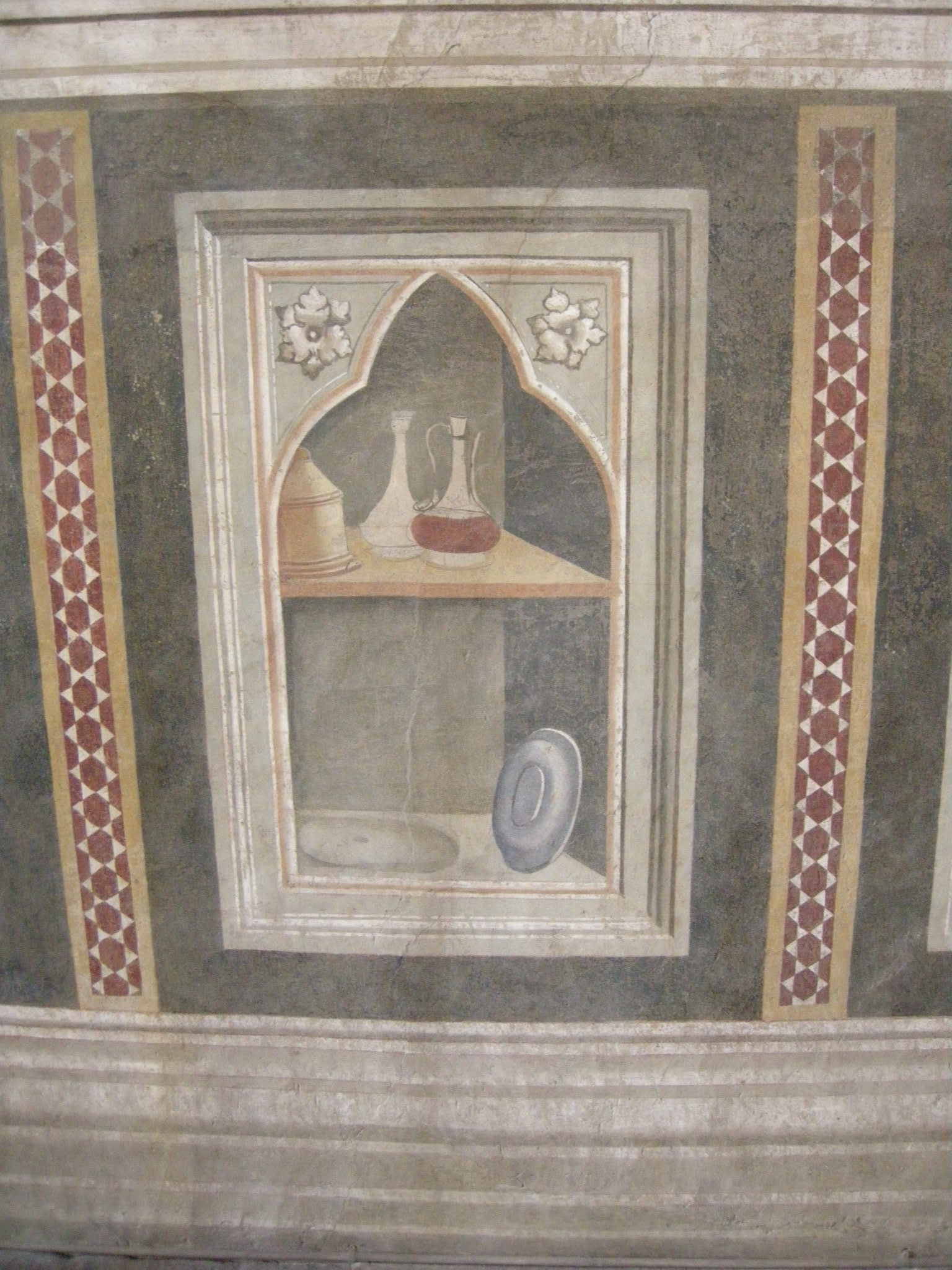 Still Life